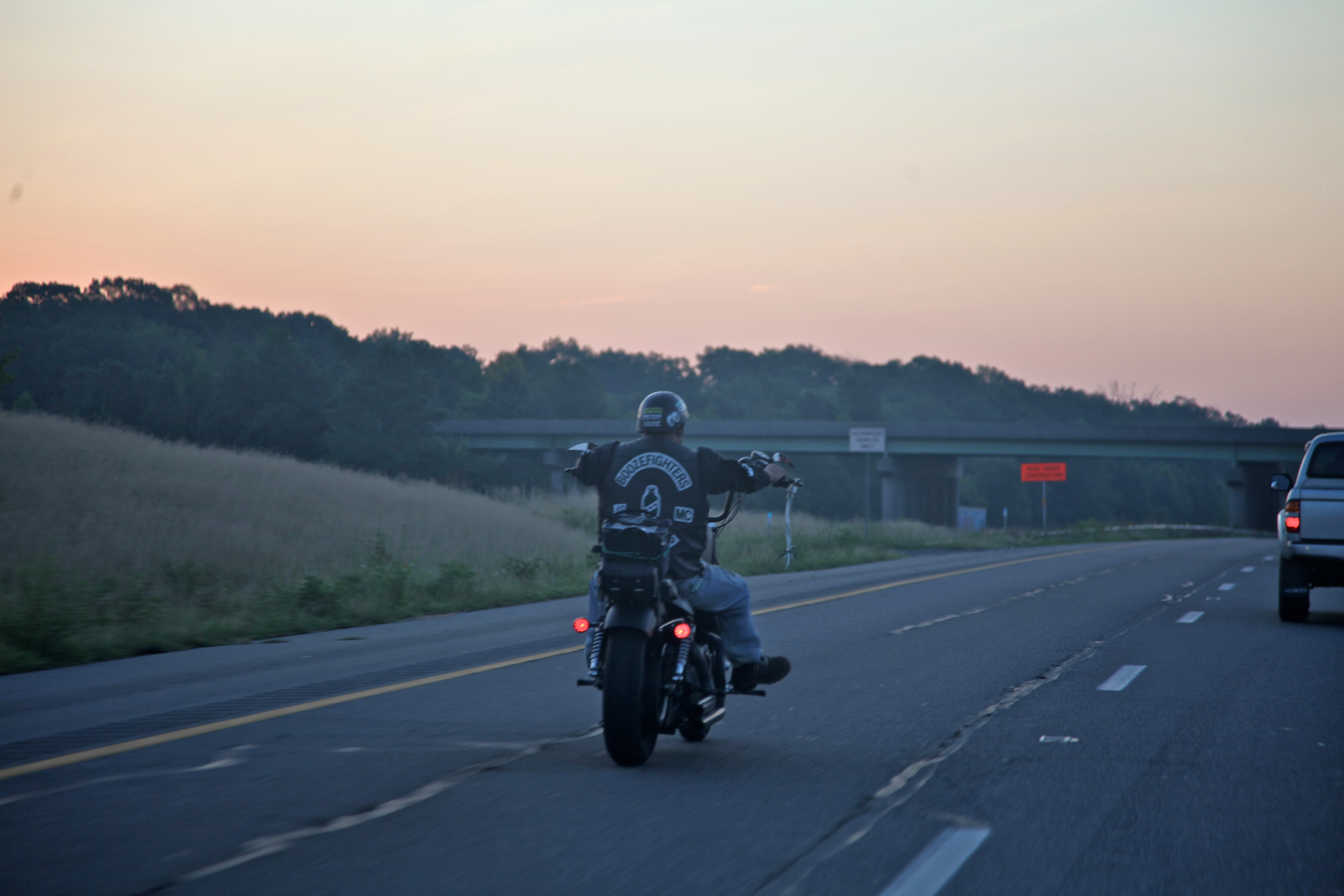 Boozefighters